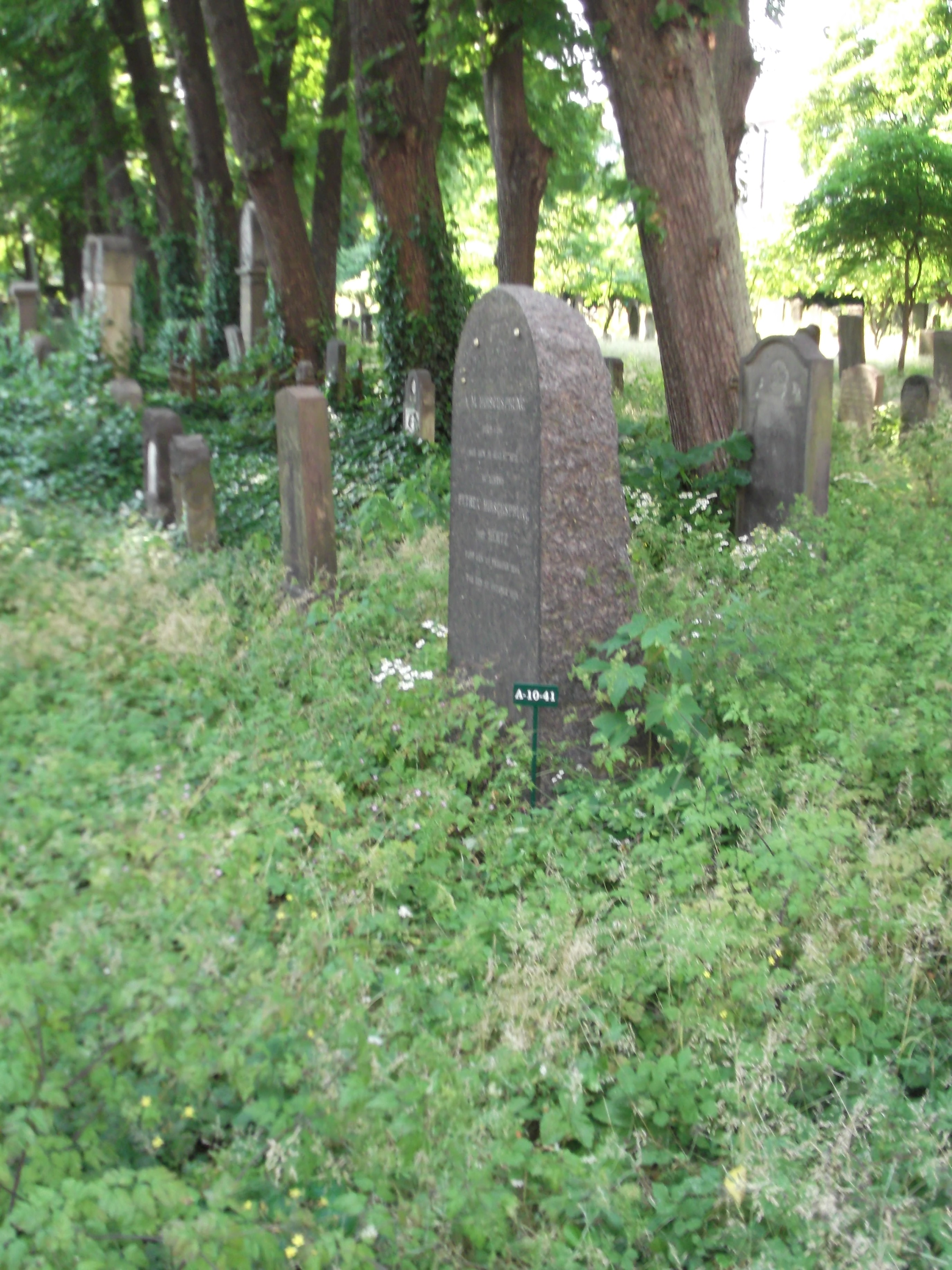 Abraham Marcus Hirschsprungs gravsten på Mosaisk Nordre Begravelsesplads